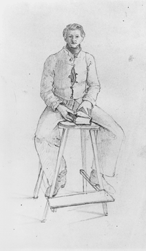 "Selbstporträt"